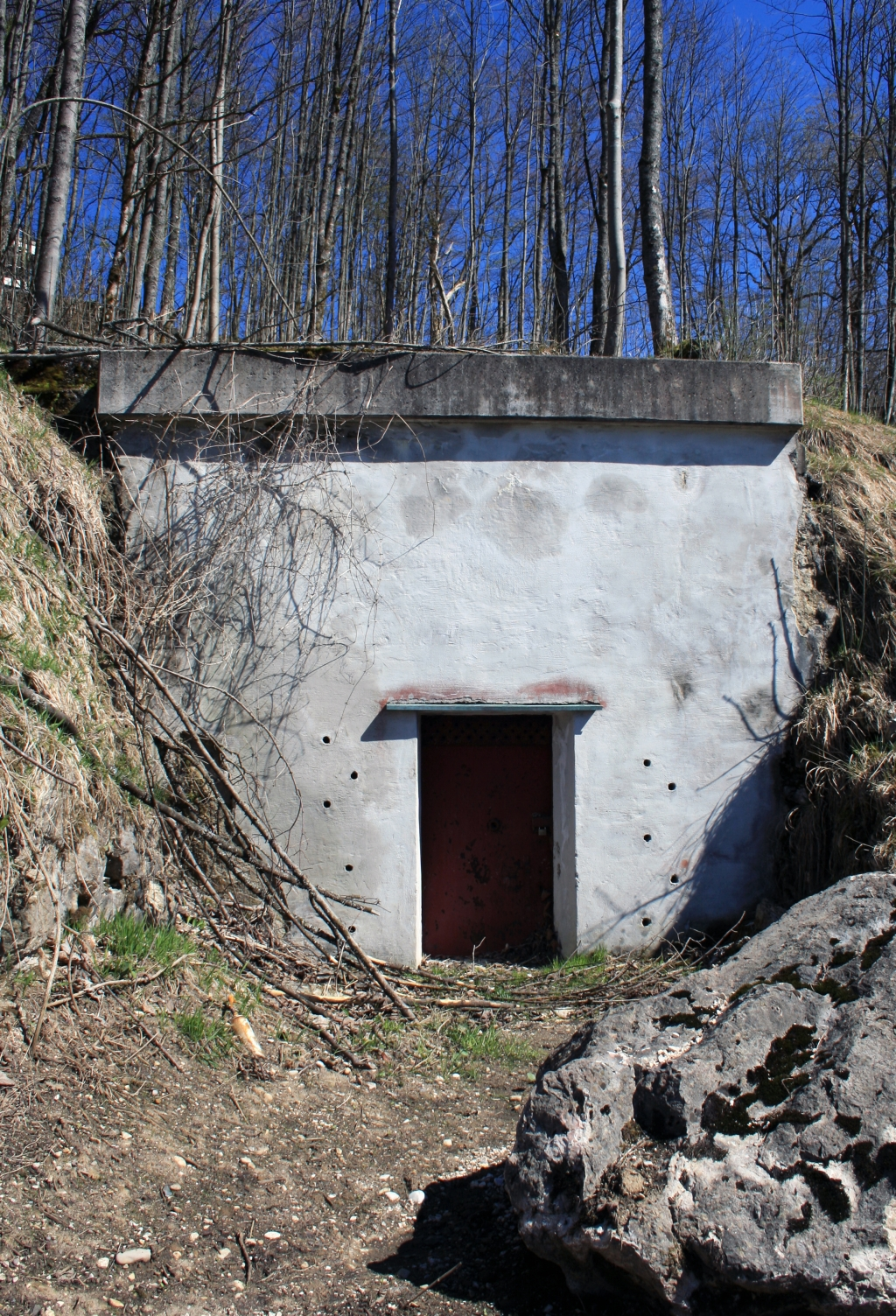 Eingang zum Bormann Bunker am Obersalzberg (Berchtesgadener Land) by Daniel Fischer [